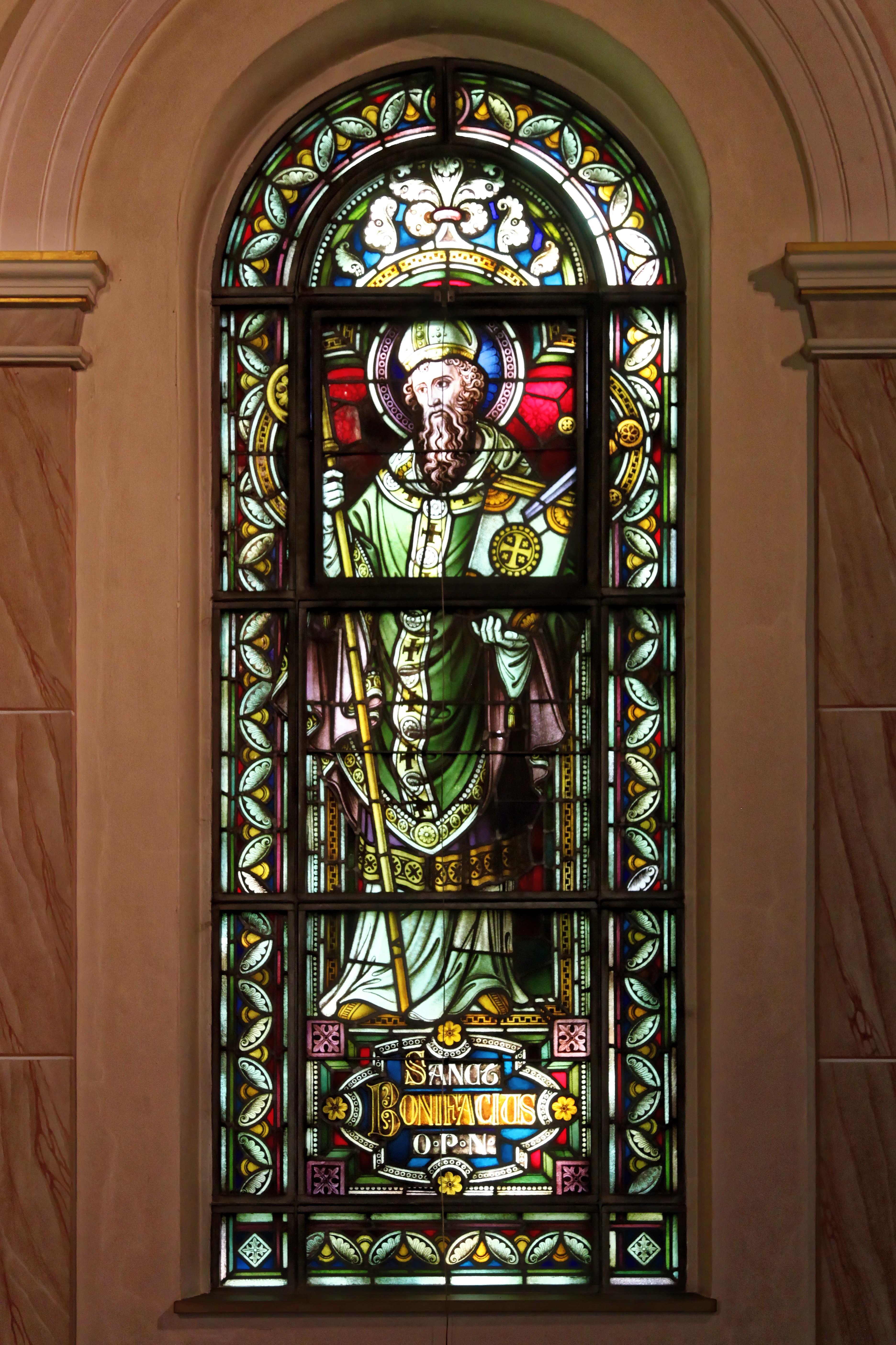 St. Bonifatius, Kirchstraße in Rhauderfehn